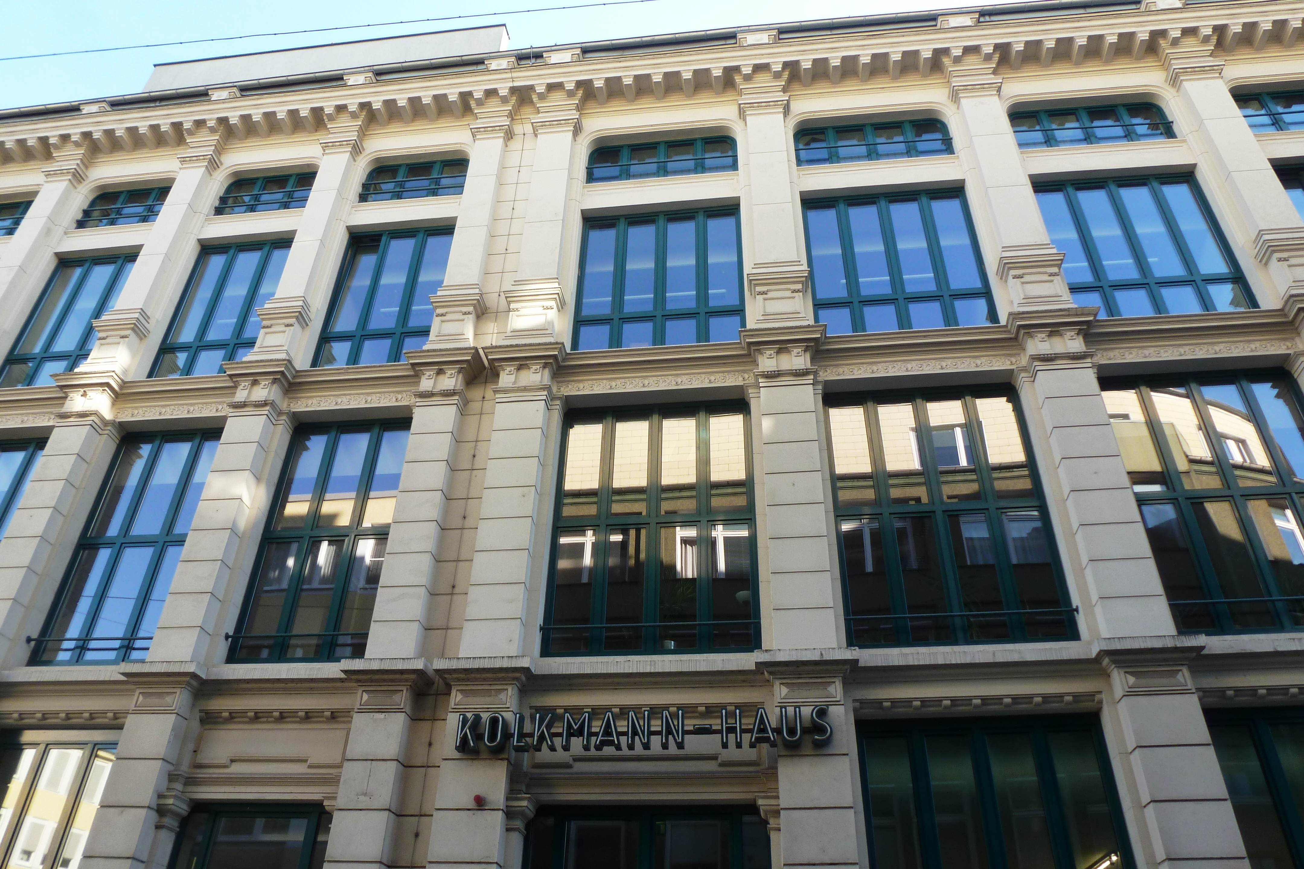 Kolkmannhaus in Wuppertal-Elberfeld, Hofaue 51-53This is a photograph of an architectural monument. 79